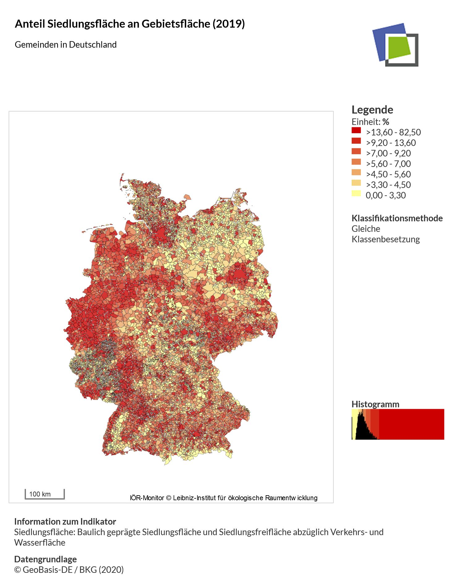 Siedlungsfläche: Baulich geprägte Siedlungsfläche und Siedlungsfreifläche abzüglich Verkehrs- und Wasserfläche